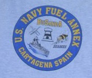 Logo Fuel Annex Cartagena, SPAIN